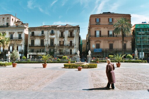 Palermo, Sicilia, Italia